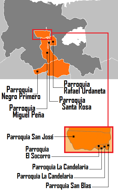 Parroquias de Valencia (Venezuela)